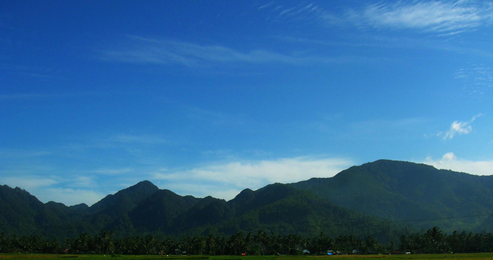 Photo de la chaîne des Bukit Barisan